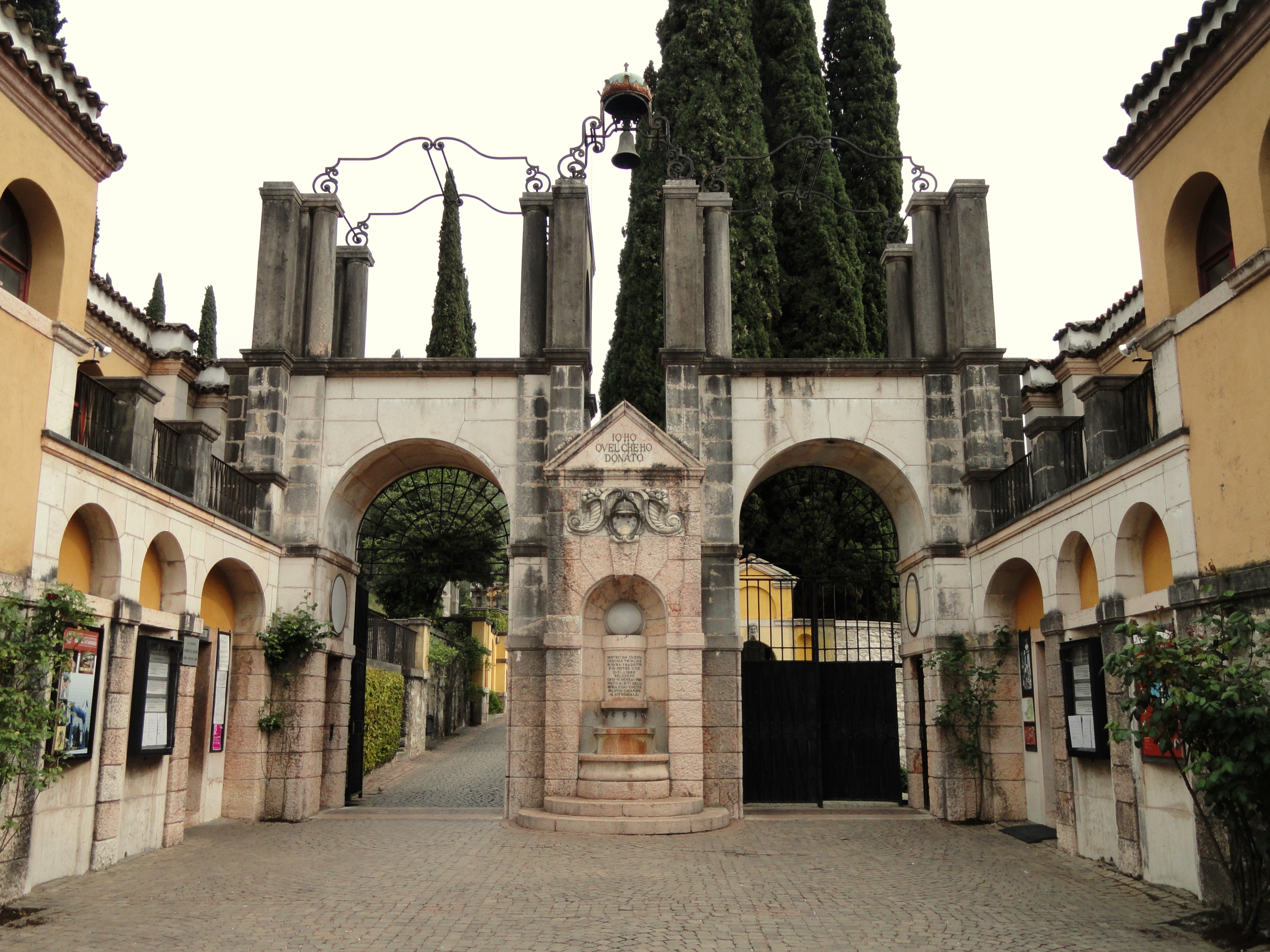 Vittoriale degli italiani, in Gardone Riviera, on Lake Garda, Brescia, Italy.